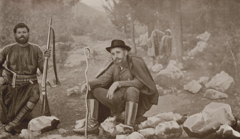 M Venizelos - Van Den Brule Alfred - 1907